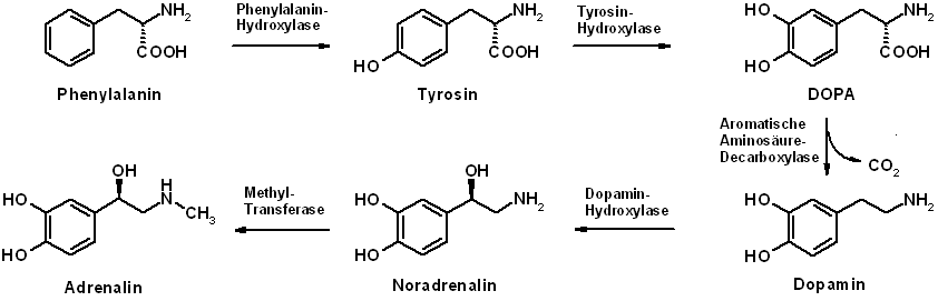 Biosynthese von Dopamin, Noradrenalin und Adrenalin aus Phenylalanin Sonstiges: Die Nutzung dieser Abbildung unterliegt keiner urheberrechtlichen Beschränkung.